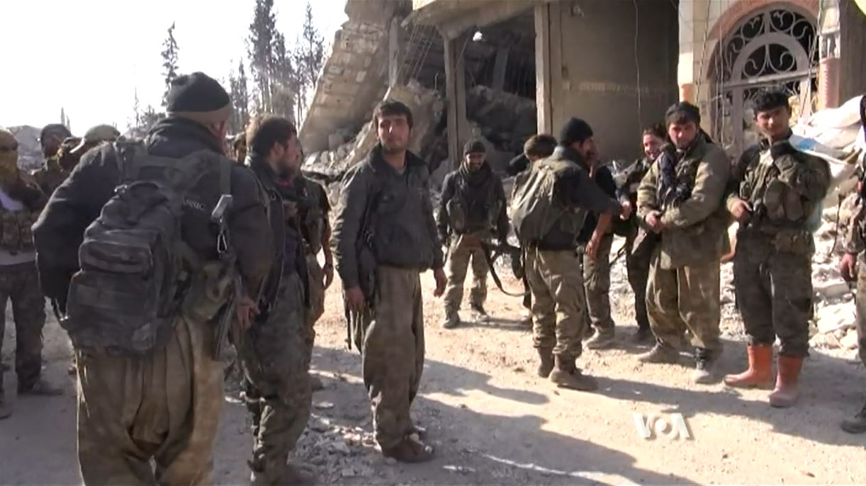 YPG à Kobané, fin janvier ou début février 2014